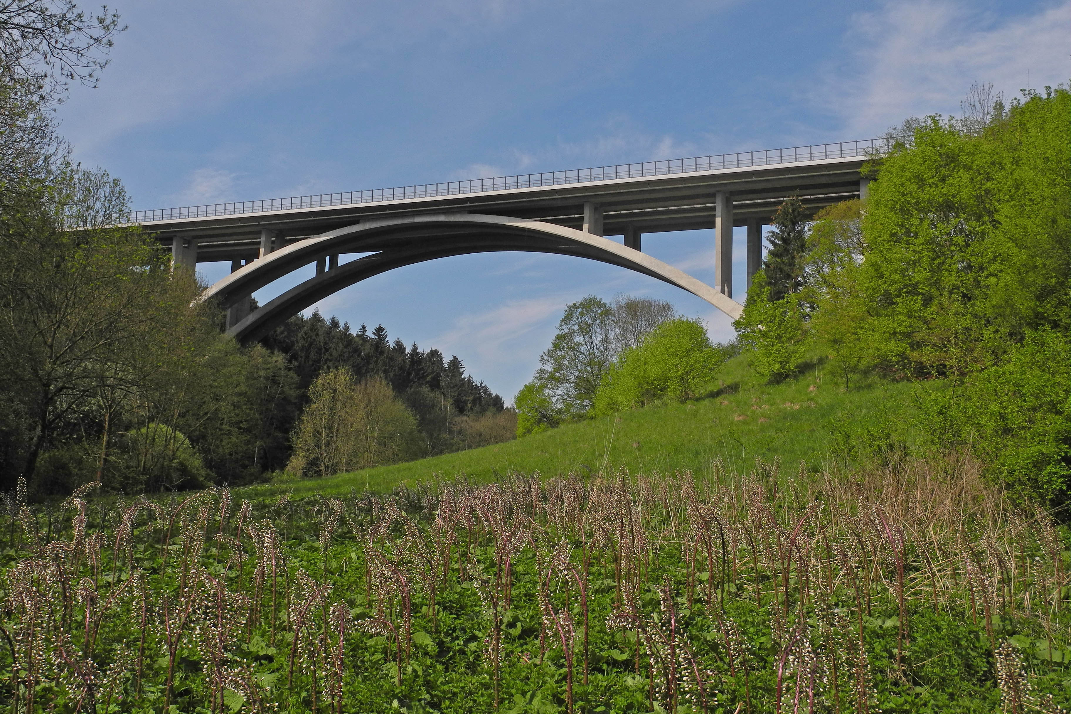 Brücke der Autobahn D8 über das Wopparner Tal (Opárenské údolí) in der Nähe der Konradsmühle (Opárenský mlýn)